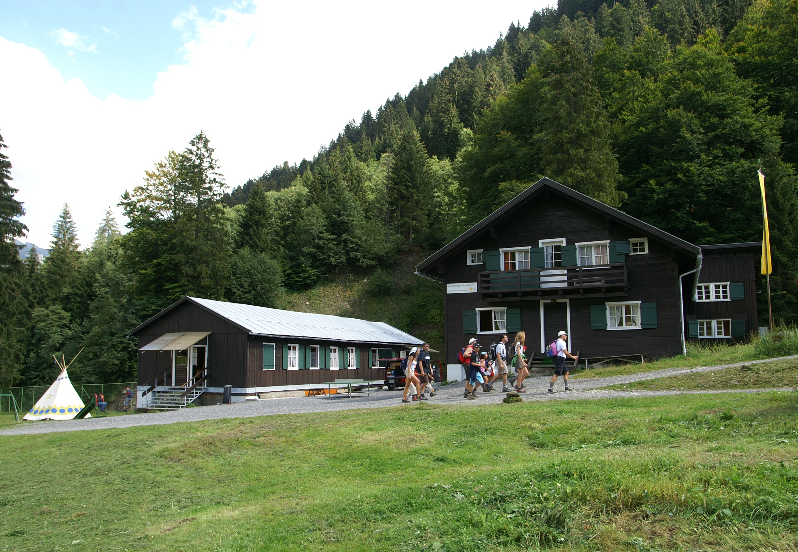 Ferienheim Kinderdorf Vorarlberg in Schönenbach bei Bizau im Bregenzerwald gegründet von Kaplan Hugo Kleinbrod im Jahre1950